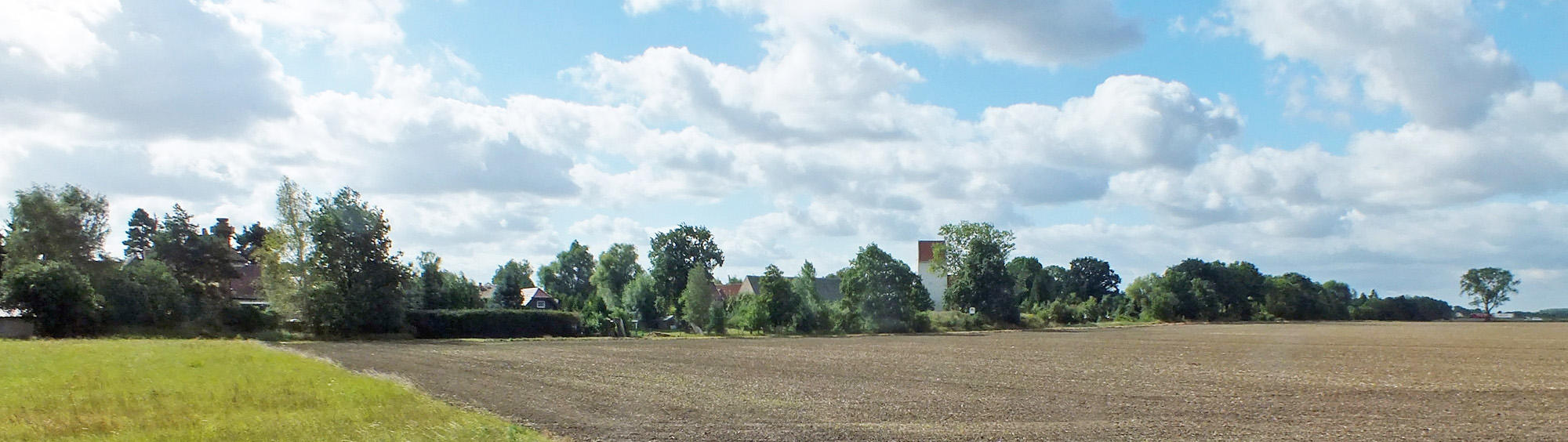 Hirschfeld von Norden gesehen